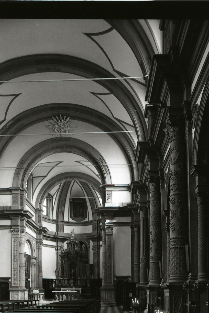 Servizio fotografico : Bergamo, 1980 / Paolo Monti. - Strisce: 7, Fotogrammi complessivi: 33 : Negativo b/n, gelatina bromuro d'argento/ pellicola ; 35 mm. - ((Sul portanegativi: N[I]K[MA]T FP4. - Confronta scheda 3506Lpbn02A-35A. - Occasione: Documentazione per la pubblicazione: Fumagalli Alberto, "Bergamo: origini e vicende storiche del centro antico", Milano, Rusconi immagini, 1981. - Monografia di Fumagalli, Alberto: Bergamo: origini e vicende storiche del centro antico, Milano, Rusconi immagini (1981). - Fonte: Agenda di Paolo Monti: Nikon Leika 3001-/ Monti 1978 (1978-1982), presso Archivio Paolo Monti. - Fonte